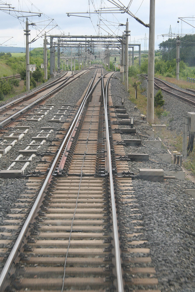 Schnellfahrweiche am Abzweig Rohrbach auf der Schnellfahrstrecke Hannover–Würzburg.